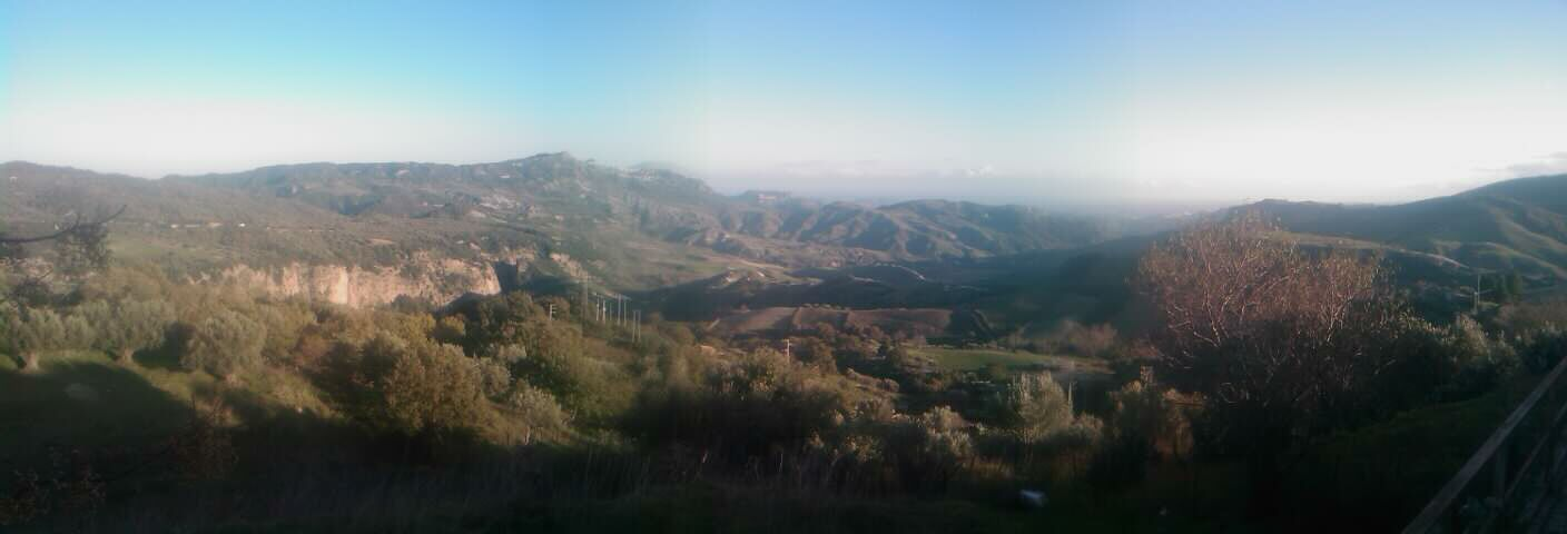 Pallagorio_Retro_Chiesa_Madre